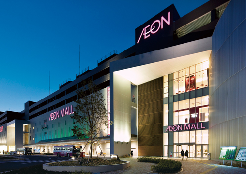 イオンとジャスコロゴの並列画像（ジャスコ福岡伊都店・福岡市西区）